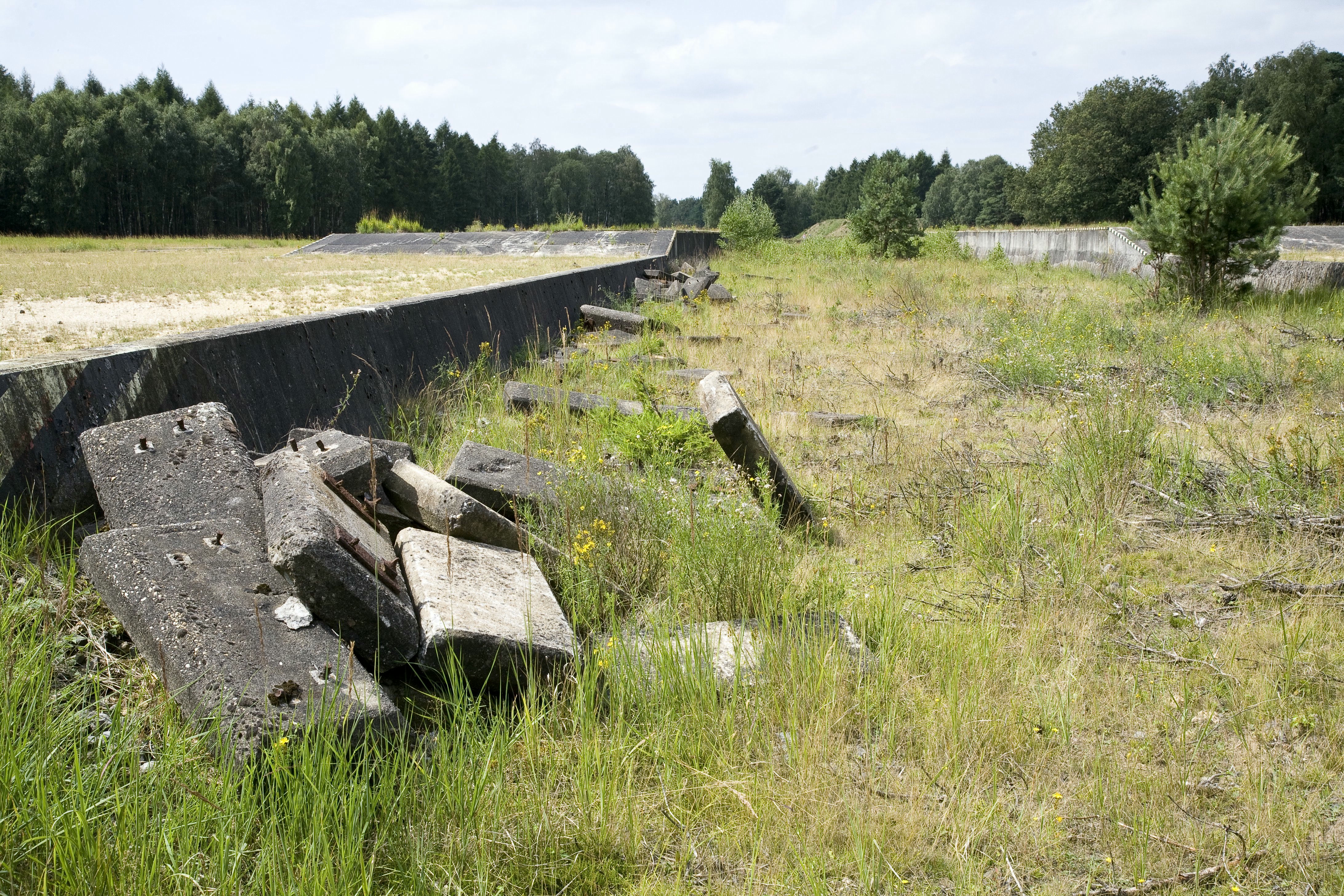 Zicht op restanten van perrons, op het terrein van verlaten munitiedepot, bij het Brachterwald (opmerking: Publicatie: TRAP Brüggen, een cultuurhistorische fietstocht)